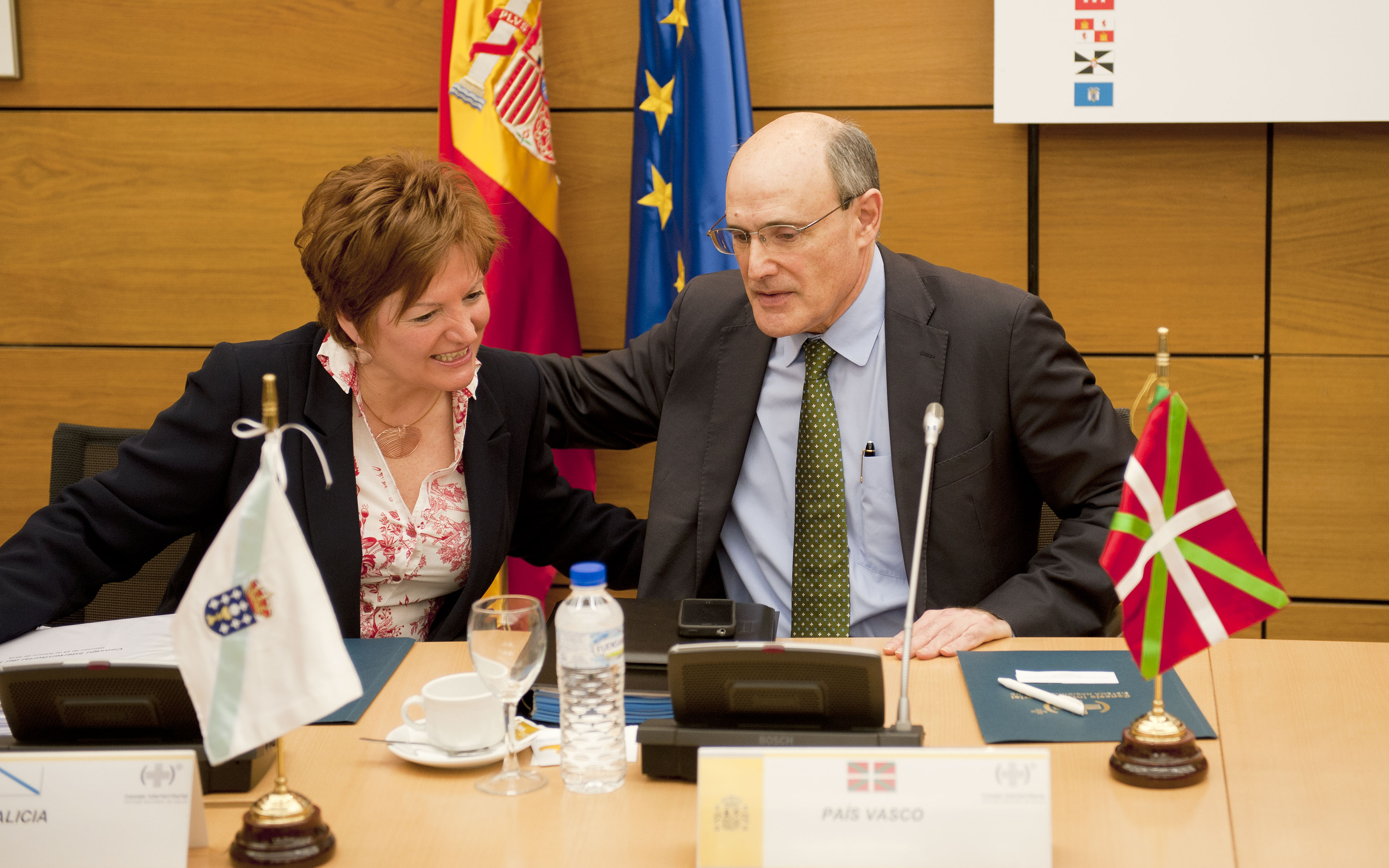 Bengoa asiste al Consejo Interterritorial de Salud (4)